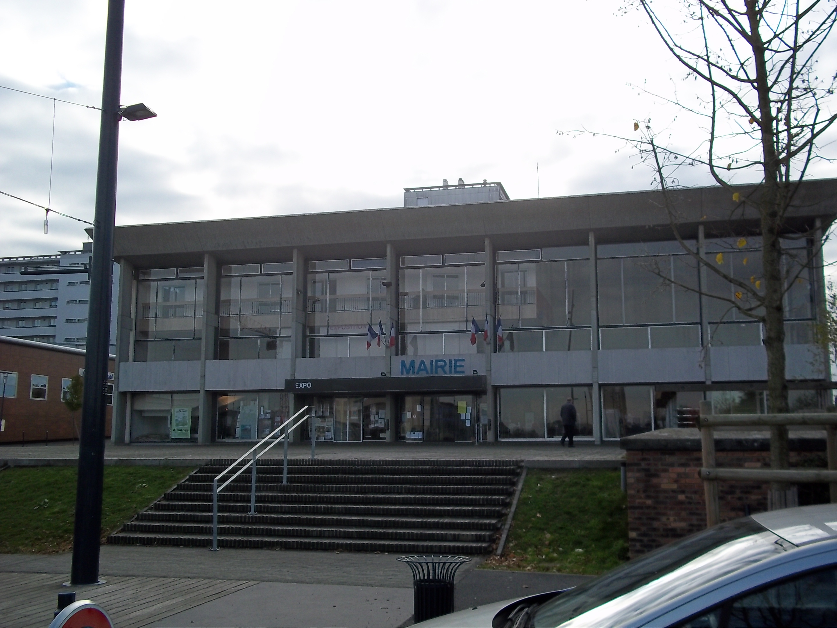 Mairie de la commune d'Allonnes